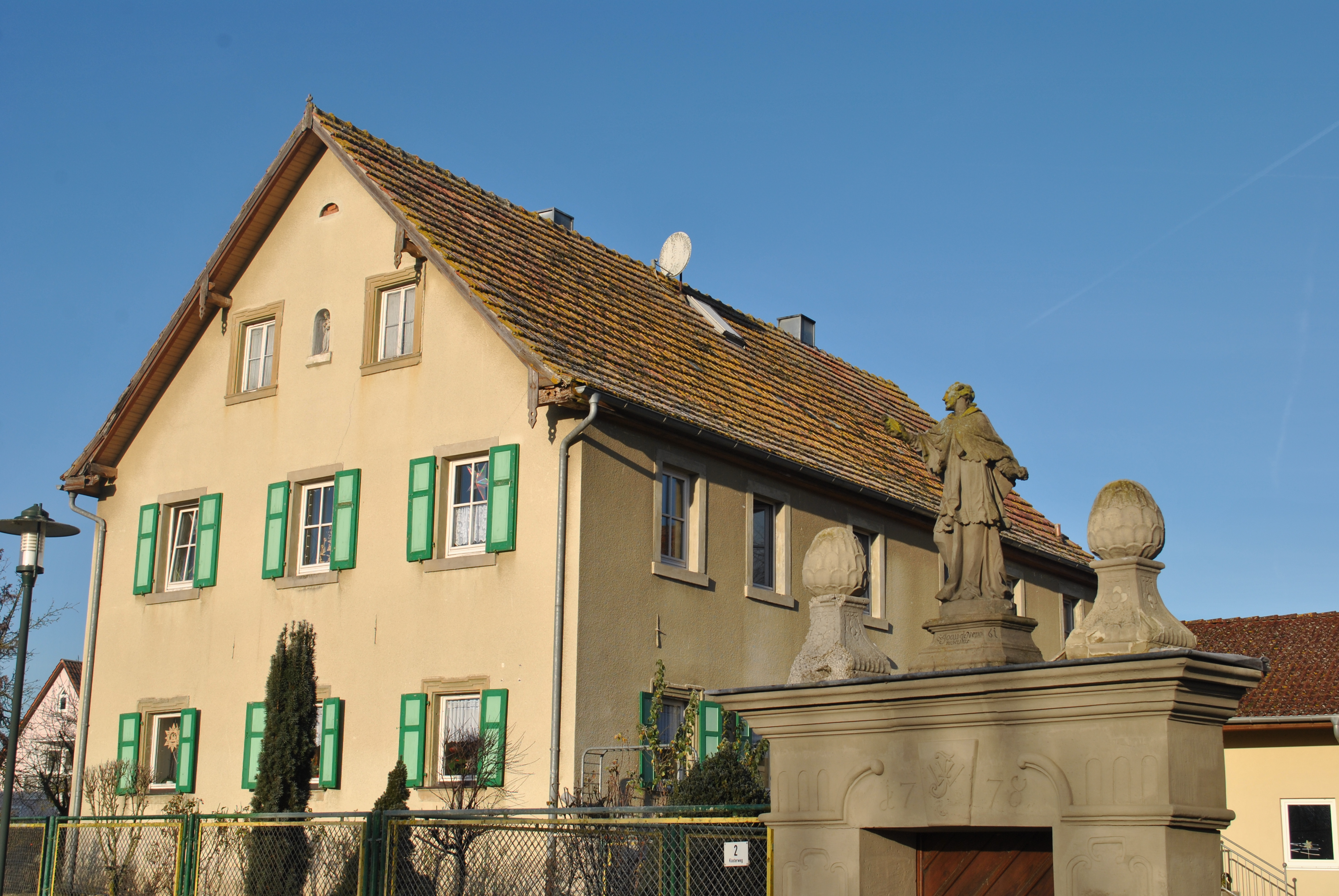 Wohnhaus teils mit geohrten Fensterrahmungen; Scheune; Nebengebäude, 18./19. Jahrhundert; Hoftor bez. 1778